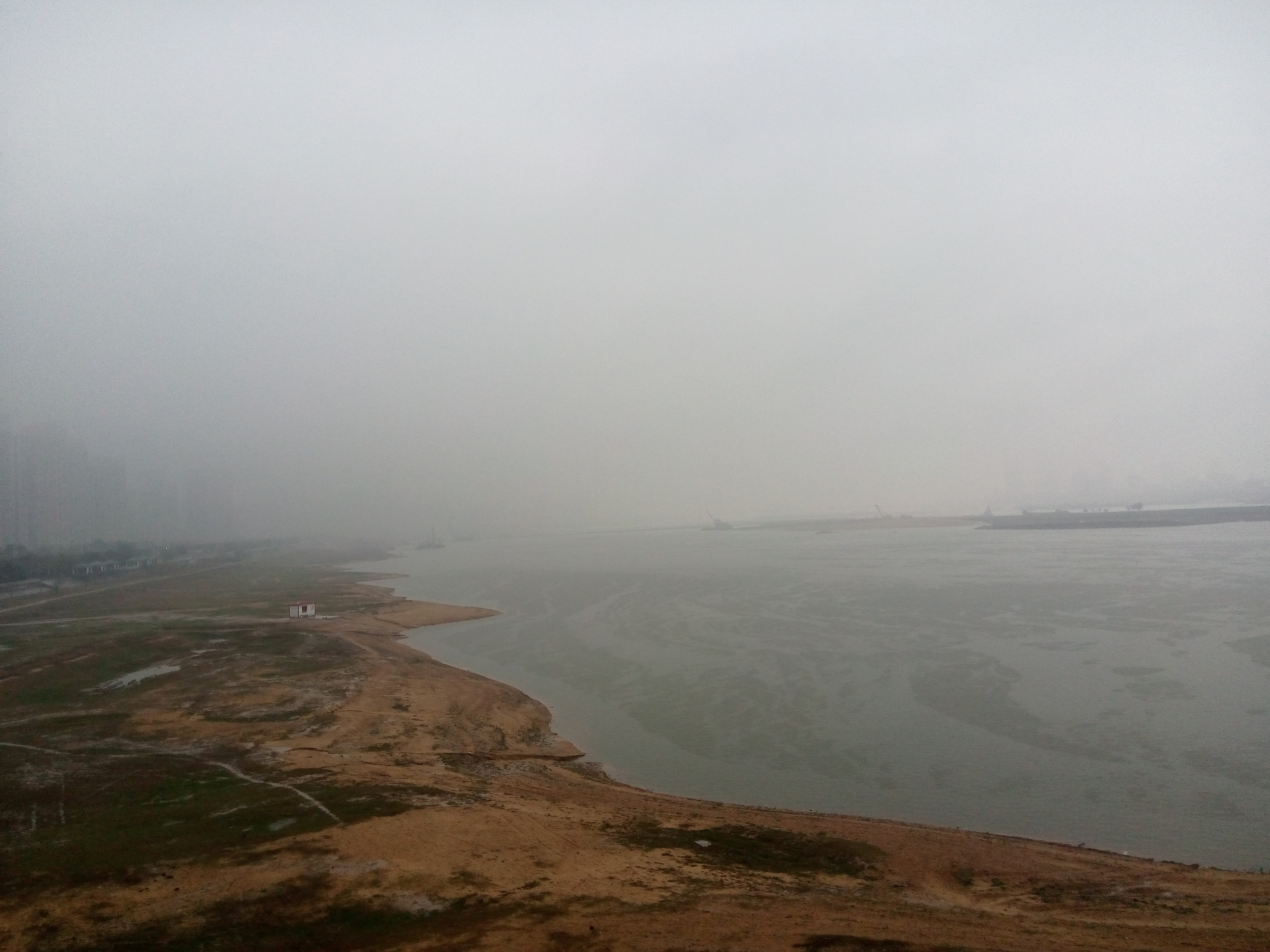 南昌大桥看赣江 朝下游